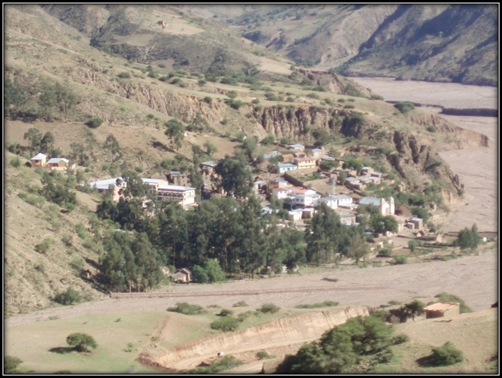 Vista general de la localidad de Tacobamba